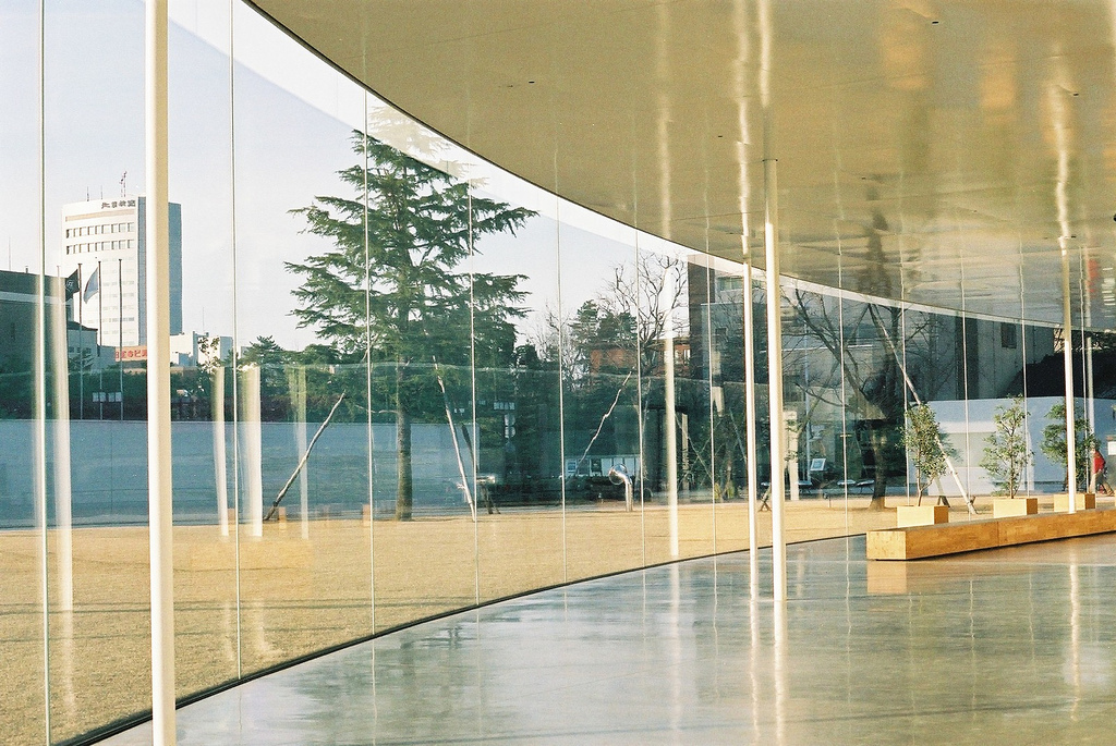 金沢２１世紀美術館／Kanazawa 21st Century Museum at Kanazawa, Japan. Architect : SANAA(Kazuyo Sejima+Ryue Nisizawa)